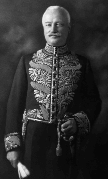 Esioff-Léon Patenaude, en habit de lieutenant-gouverneur